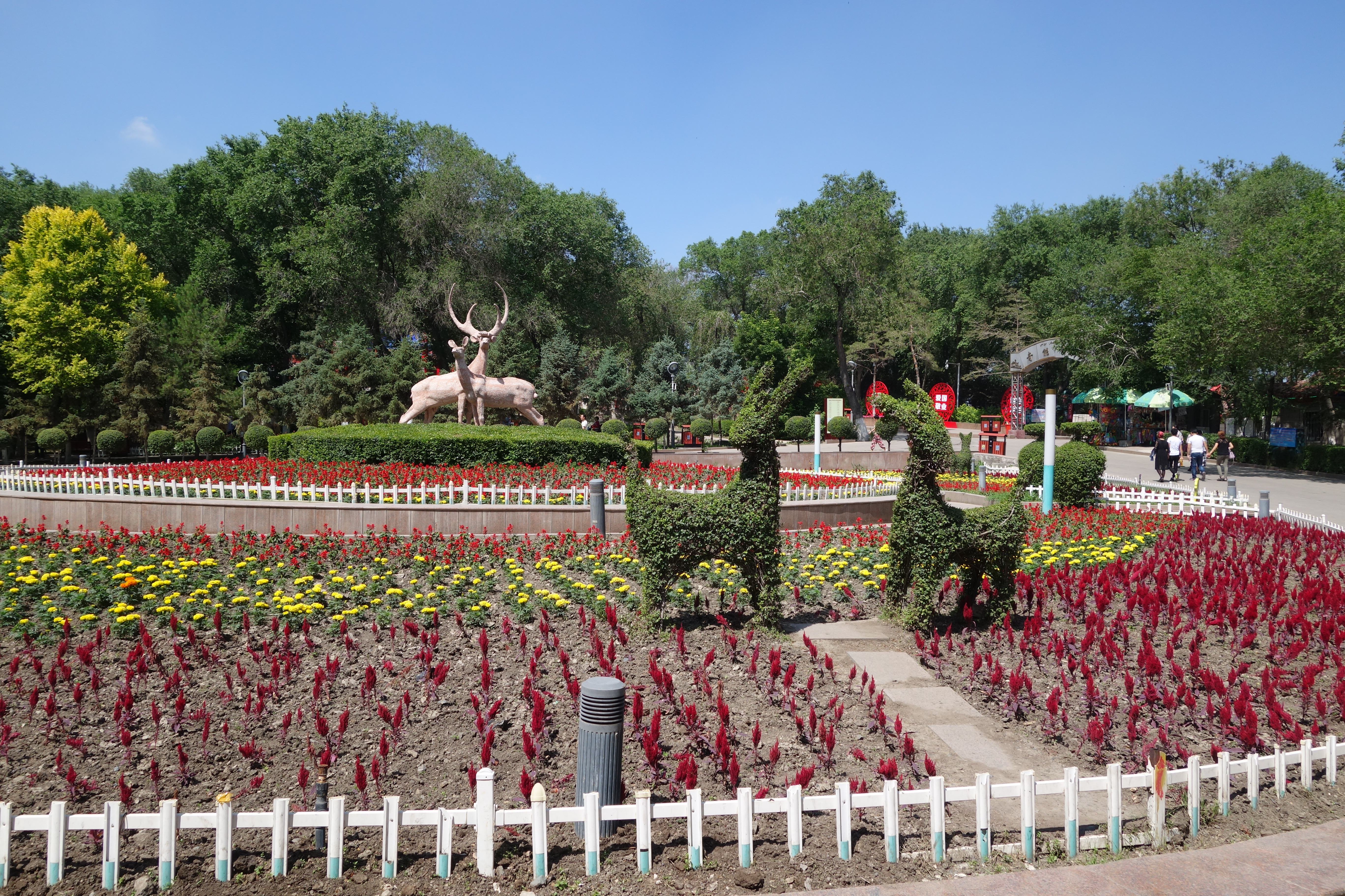 Hongshan Park, Ürümqi, China